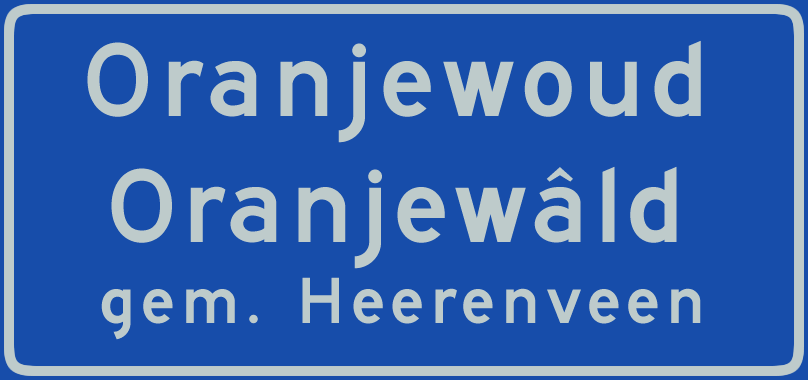 Tweetalig bebouwde kom bord Oranjewoud